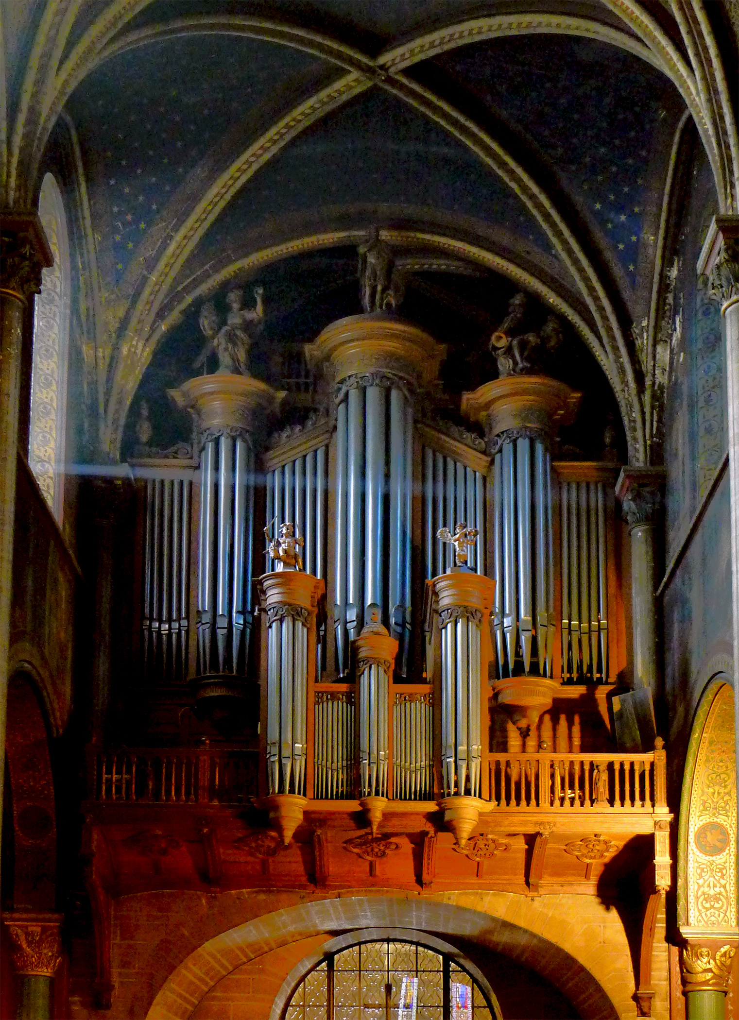 Eglise St-Germain-des-Prés (orgues) - Paris VI This building is en partie classé, en partie inscrit au titre des Monuments Historiques. It is indexed in the Base Mérimée, a database of architectural heritage maintained by the French Ministry of Culture, under the references PA00088489 and PA00088509 .